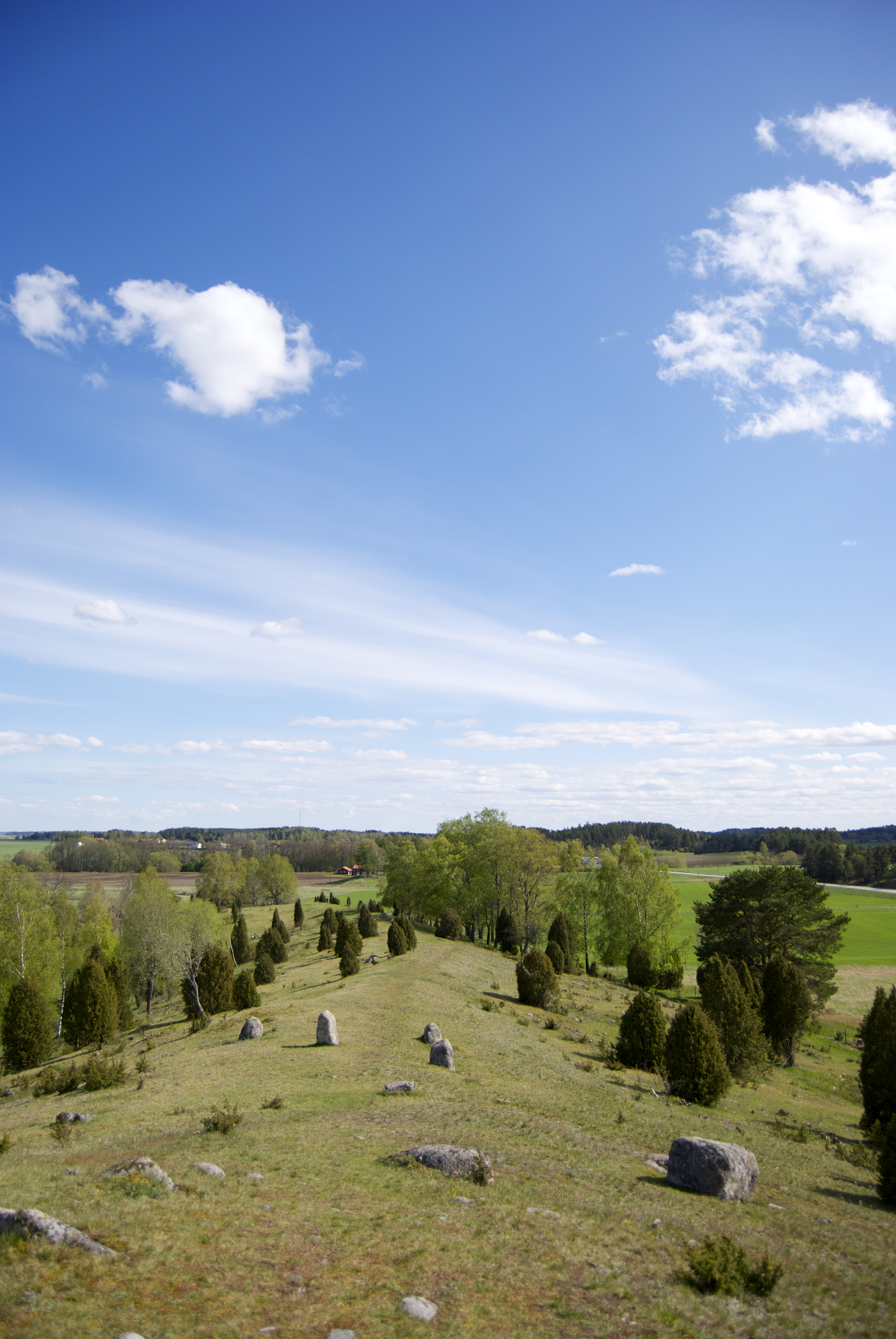 Utsikten från Vånsjöåsen